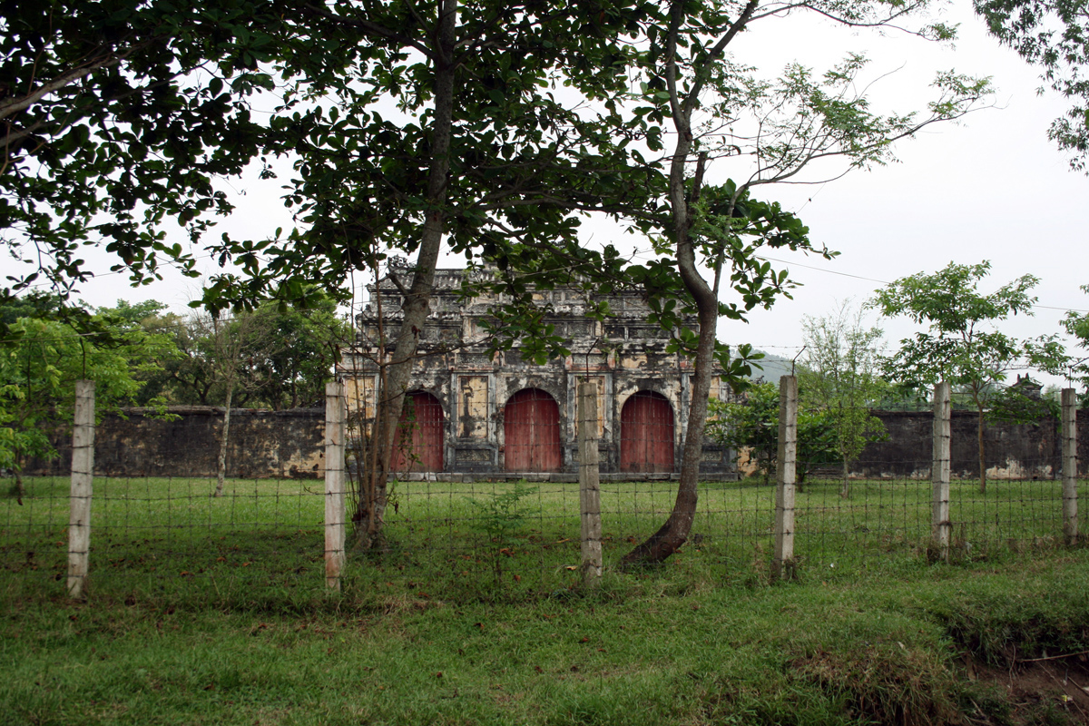 Cổng An Lăng, nơi thờ cúng vua Dục Đức, Thành Thái và Duy Tân